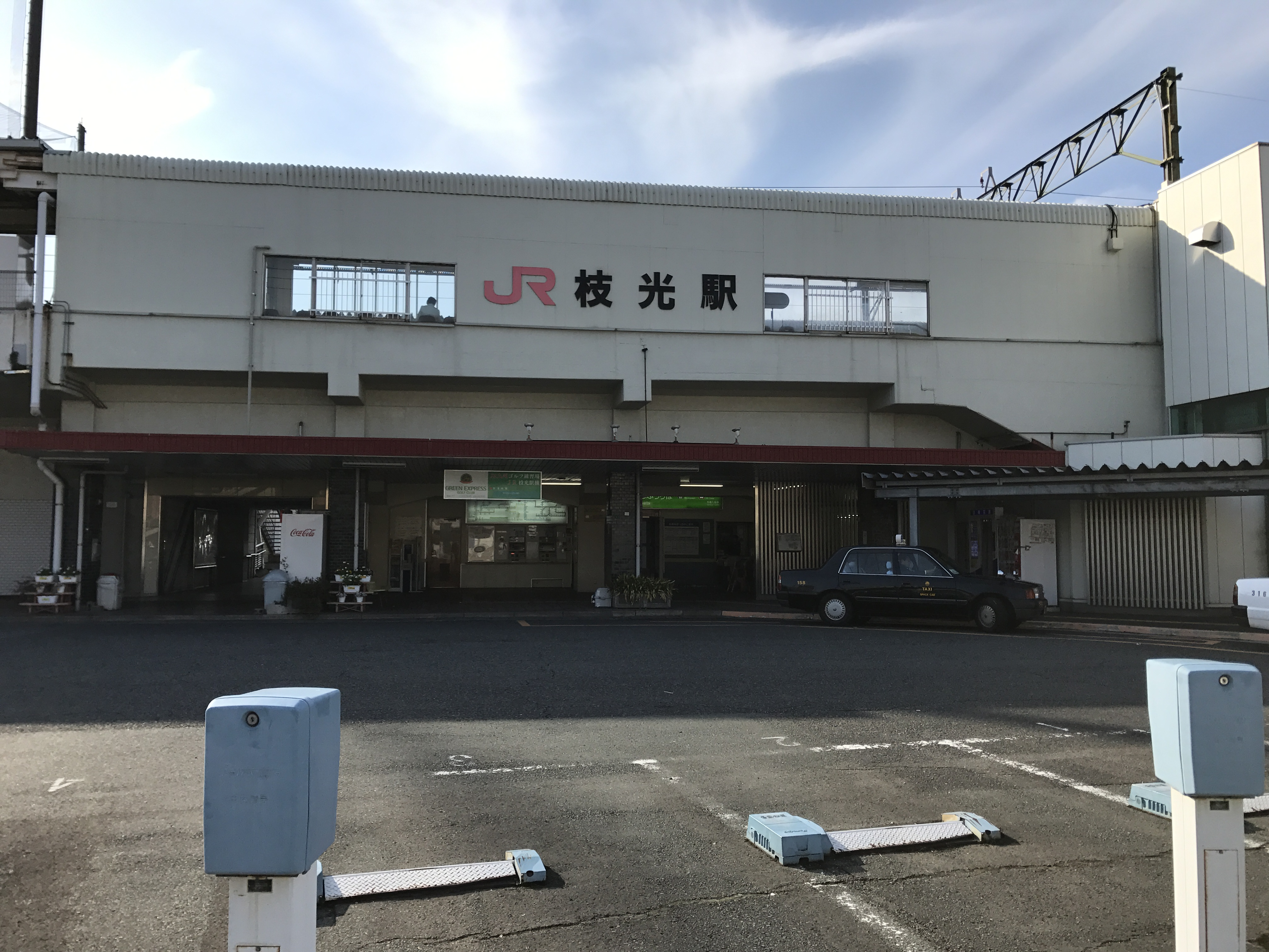 枝光駅駅舎